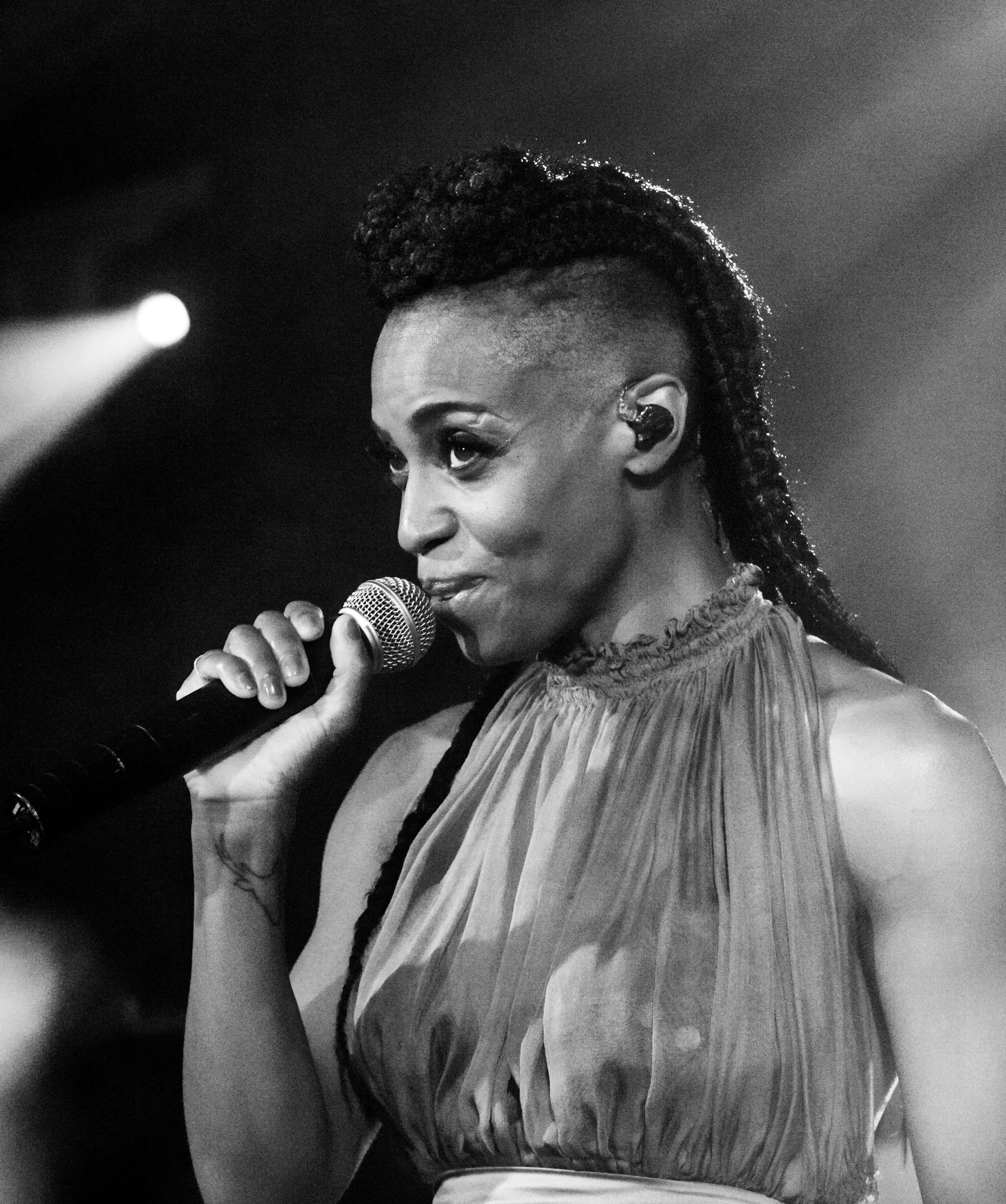 Bilder vom Zelt Musik Festival 2018 in Freiburg im Breisgau Morcheeba Auftritt am 31. Juli 2018 im Spiegelzelt